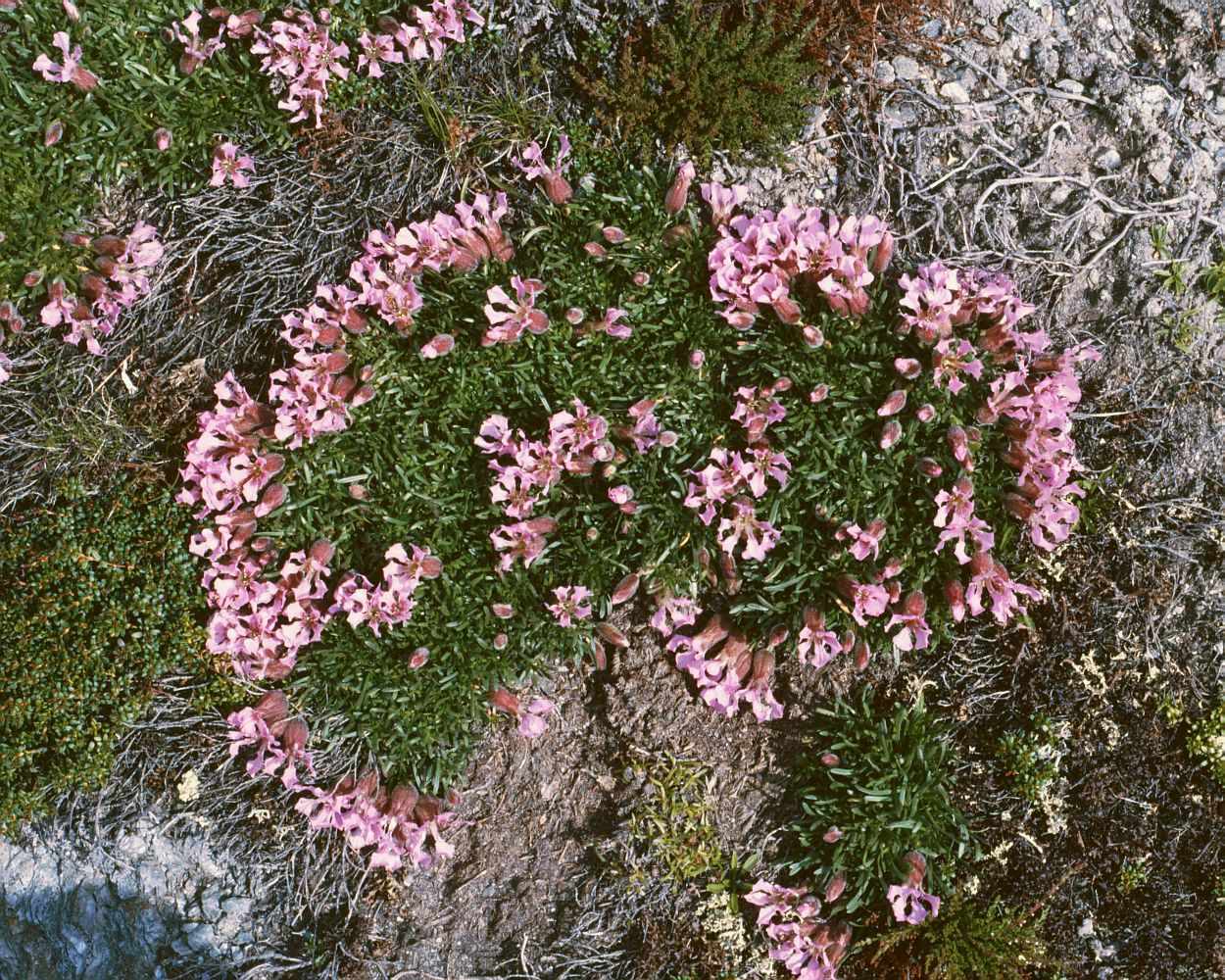 Zwerg-Seifenkraut (Saponaria pumila), Nelkengewächse (Caryophyllaceae) - Österreich/Austria/Autriche: Kärnten/Carinthia, Nockberge, Gregerlenock